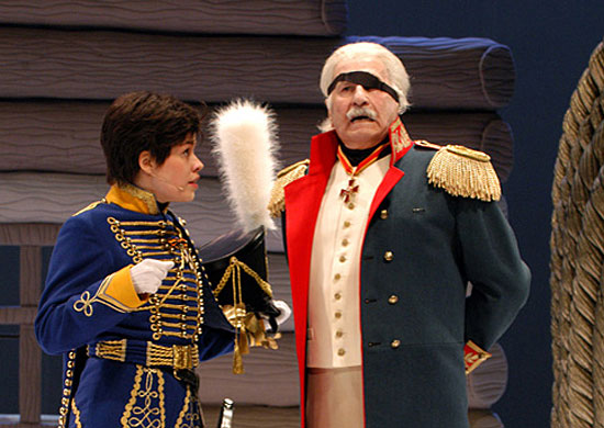 Спектакль Центрального академического театра Российской армии «Давным-давно»